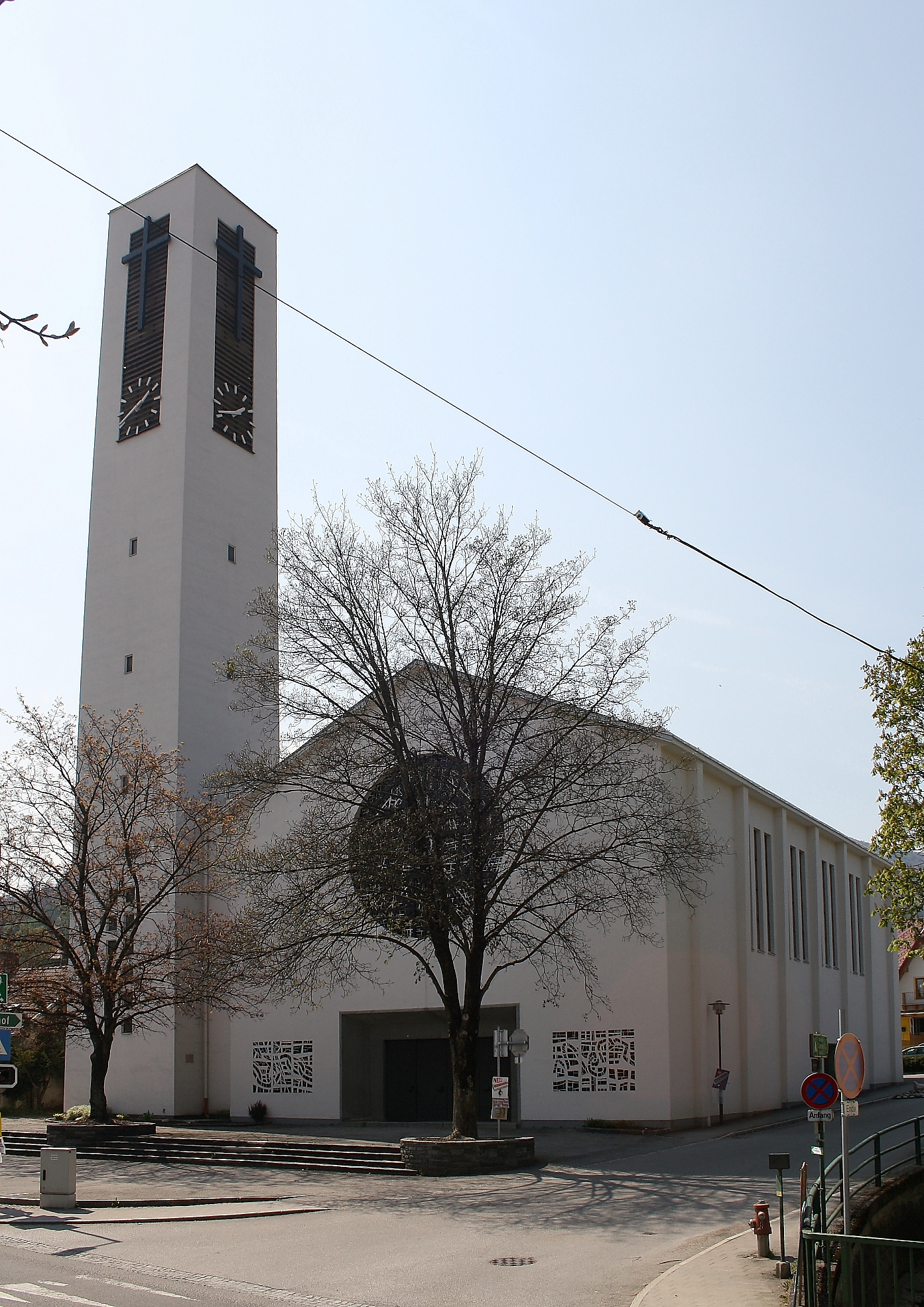 Pfarrkirche der niederösterreichischen Gemeinde Traisen